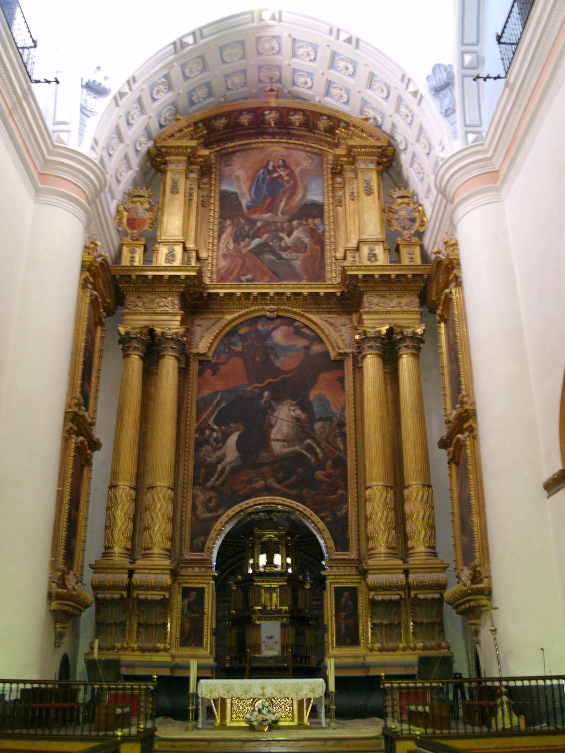 Altar mayor de la iglesia del monasterio de san millan de yuso. La rioja. Patrimonio de la Humanidad